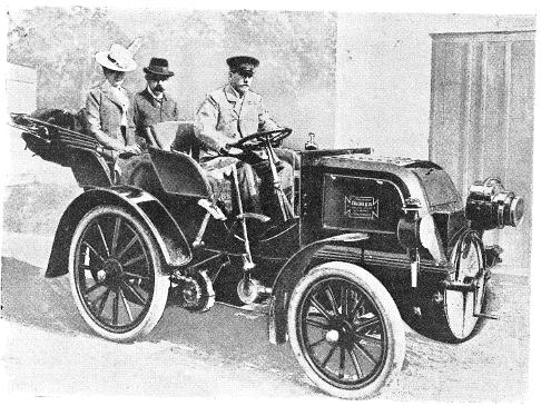 Der österreichische Thronfolger Erzherzog Franz Ferdinand und seine Gemahlin Fürstin Sophie Hohenberg, geführt von Josef Eduard Bierenz auf einem Wiener Neustädter Daimler-Wagen aus dem Jahre 1901.